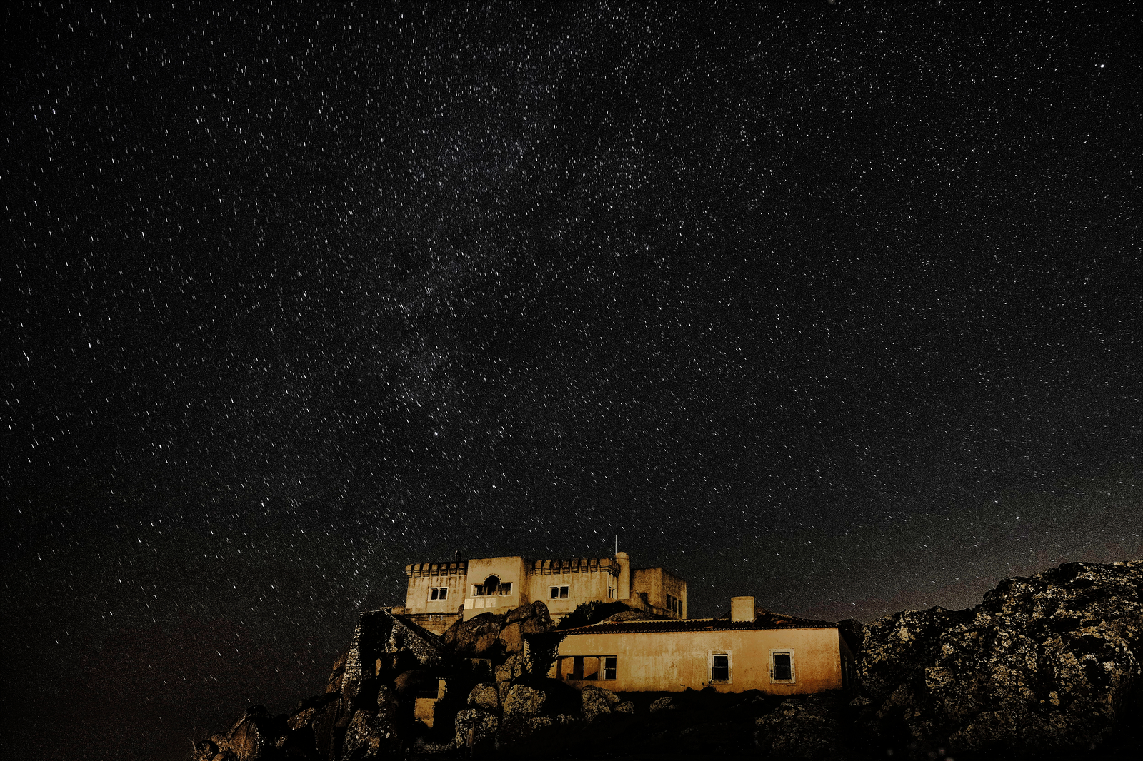 Parque Natural de Sintra-Cascais, Vista do Santuário da Peninha, durante a noite com céu etrelado. This is a photography of a protected area of Portugal indexed in the World Database on Protected Areas with the ID: 5809 (WDPA)